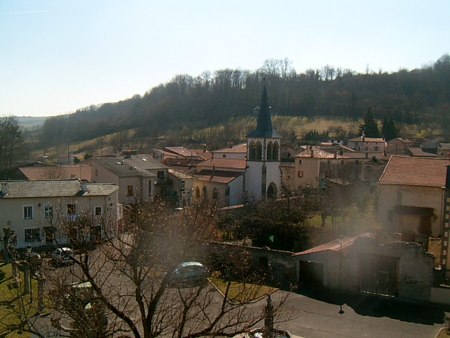 Vue de l'Eglise de SAINT-VINCENT